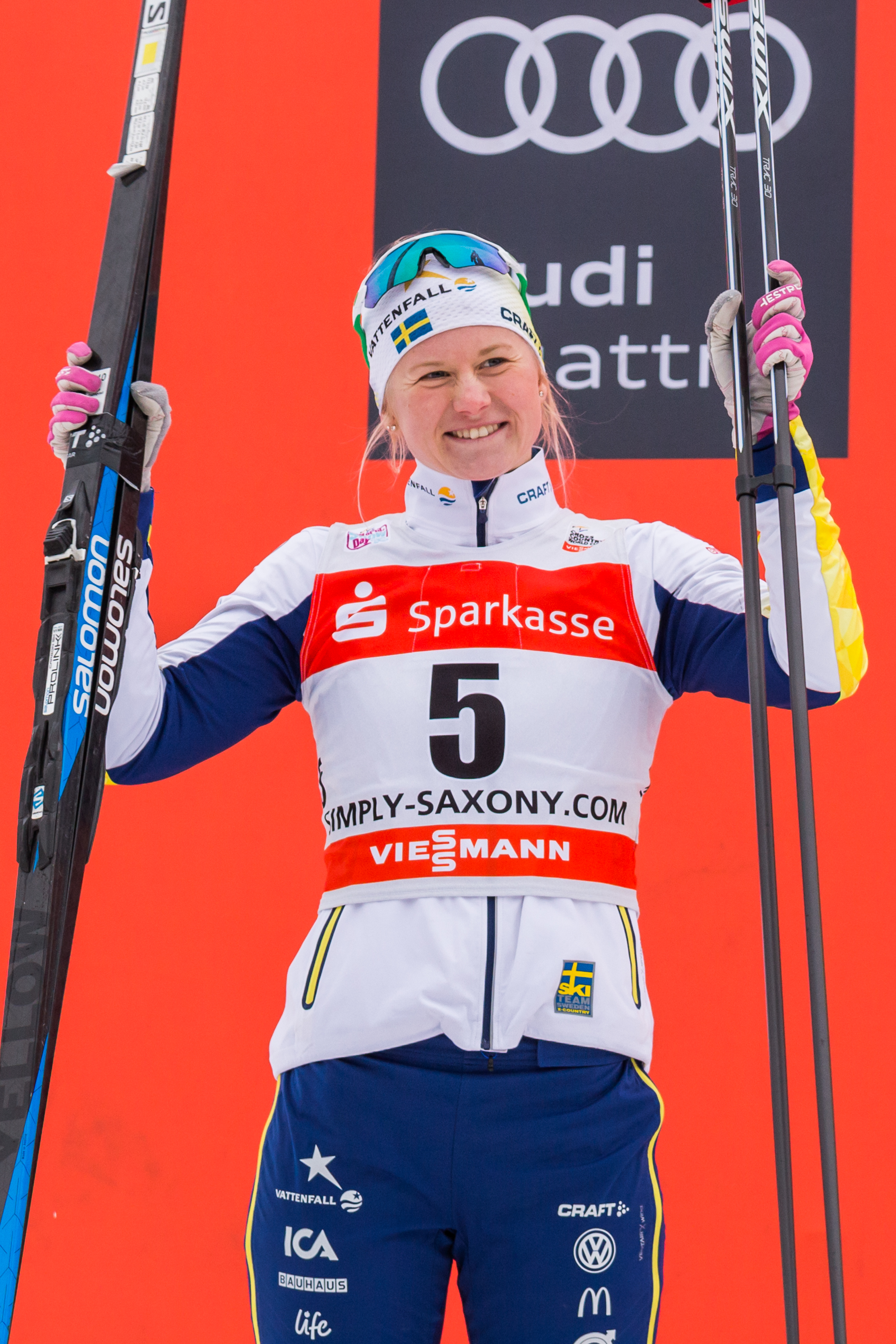 Maja Dahlqvist (SWE, Schweden), Zweitplatzierter, Silbermedaille, silver medal